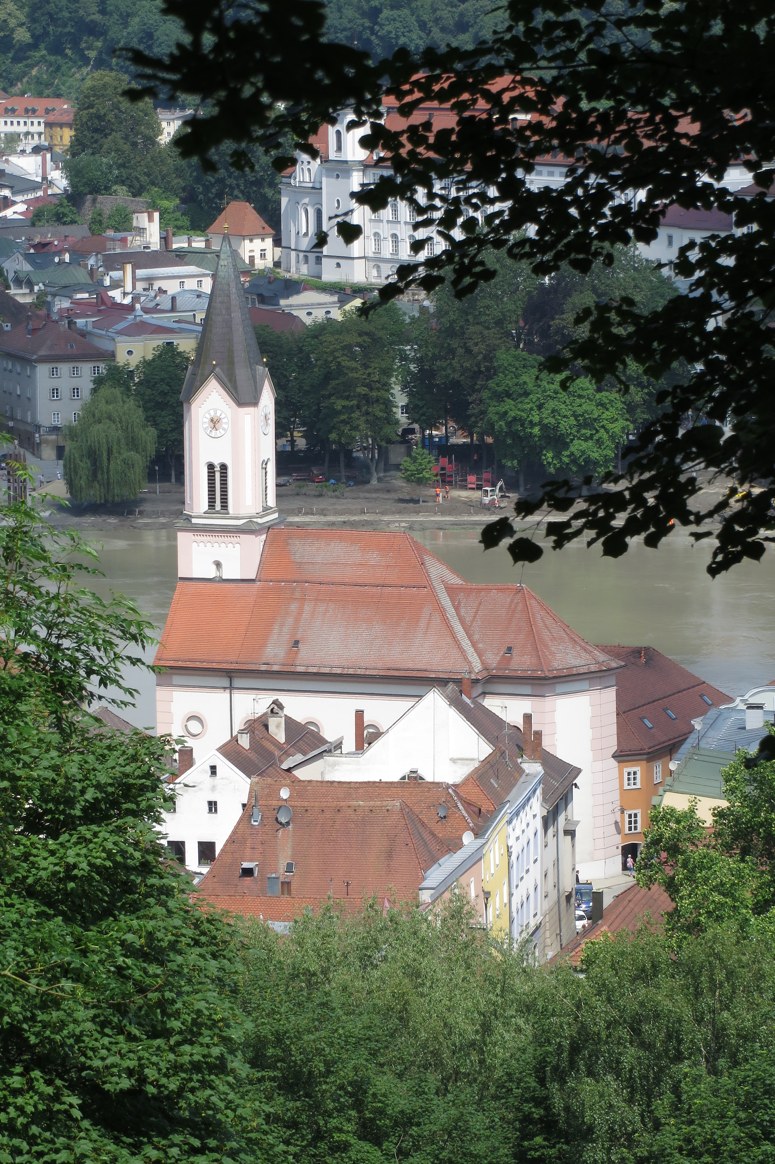 St. Gertraud, Passau This is a photograph of an architectural monument.